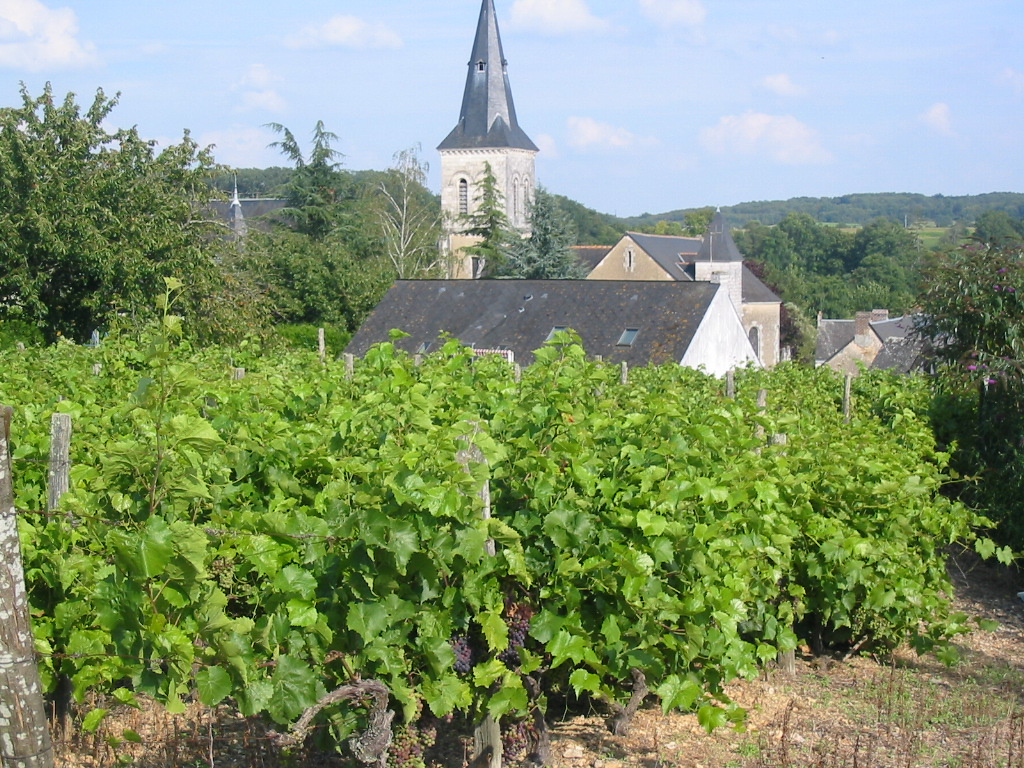 Vue générale Dissé sous le Lude